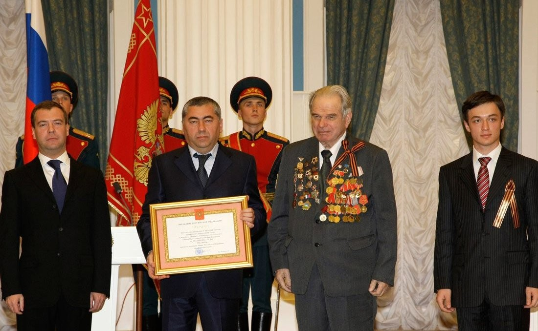 Вручение грамоты о присвоении почётного звания «Город воинской славы» представителям Нальчика.